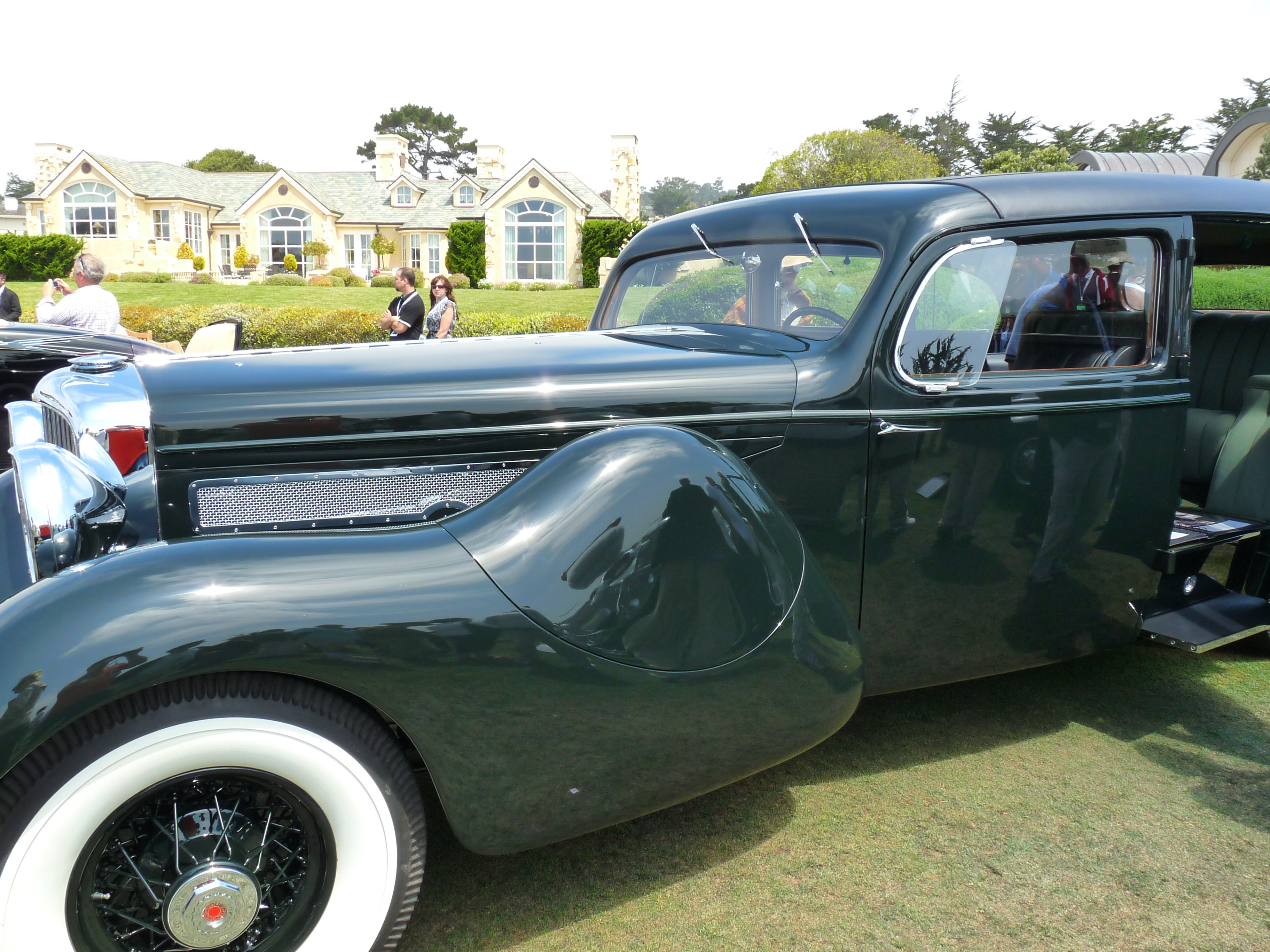 1937 Duesenberg J, Bohman & Schwartz Landaulet, (formal sedan)